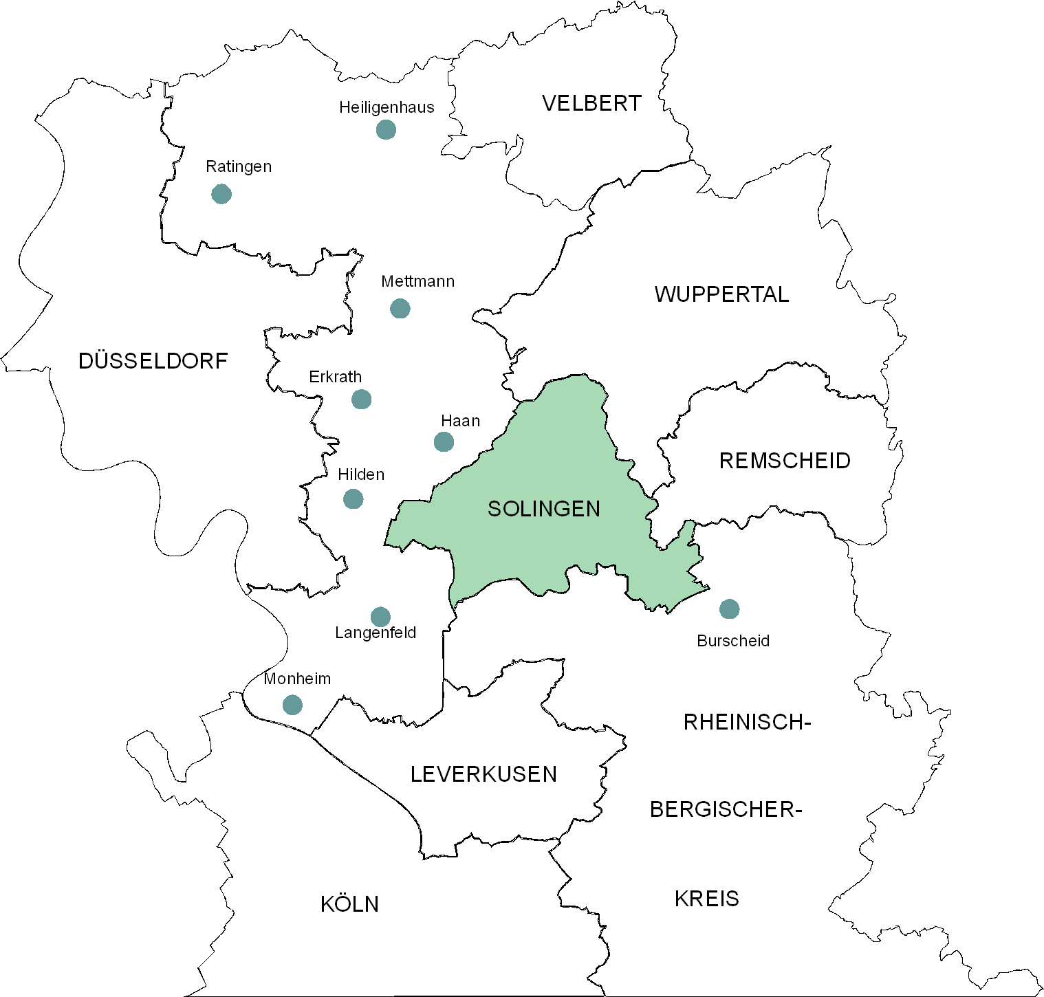 Netzgebiete der Stadtwerke Solingen Netz GmbH